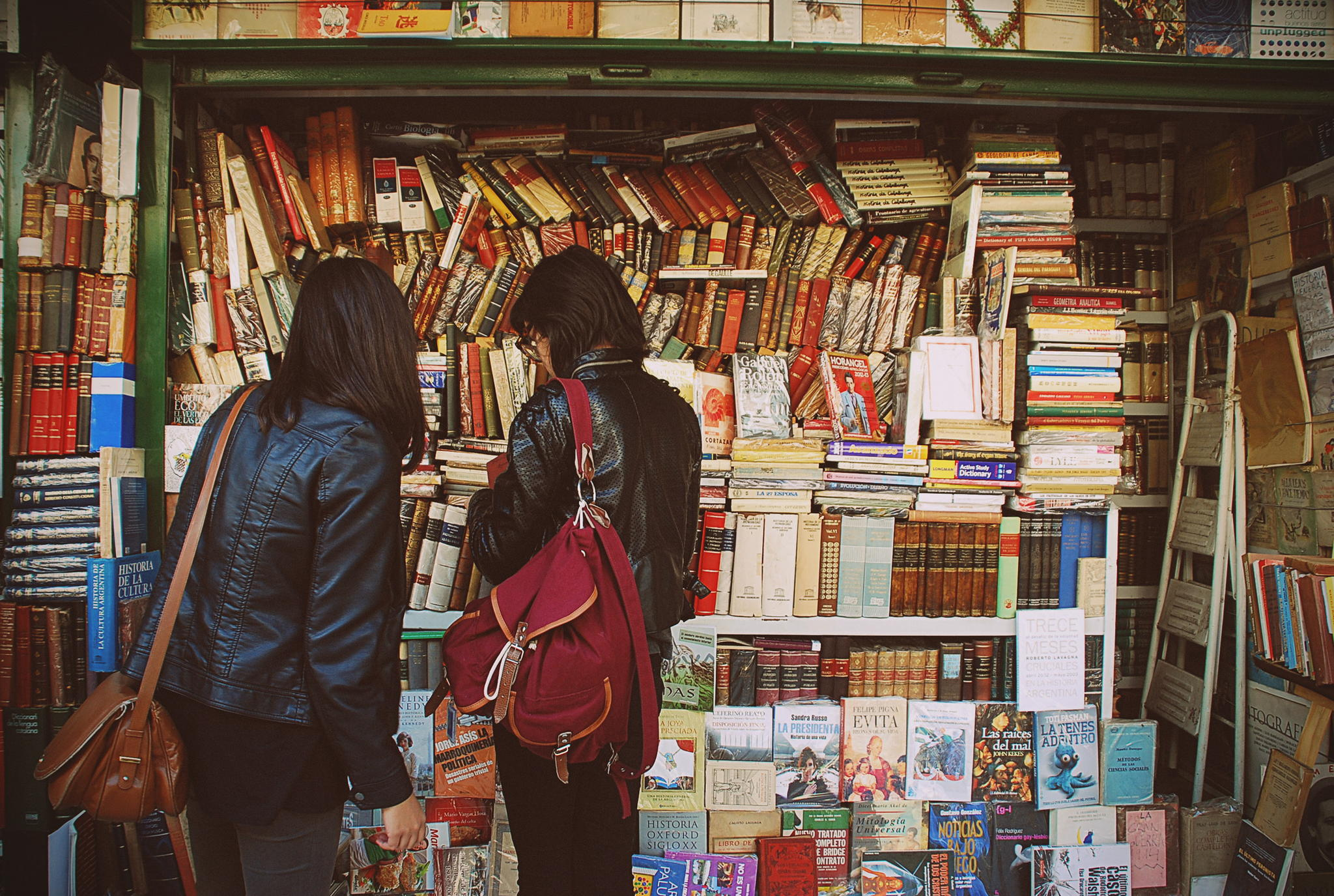 Покупатель в книжной лавке (Аргентина)